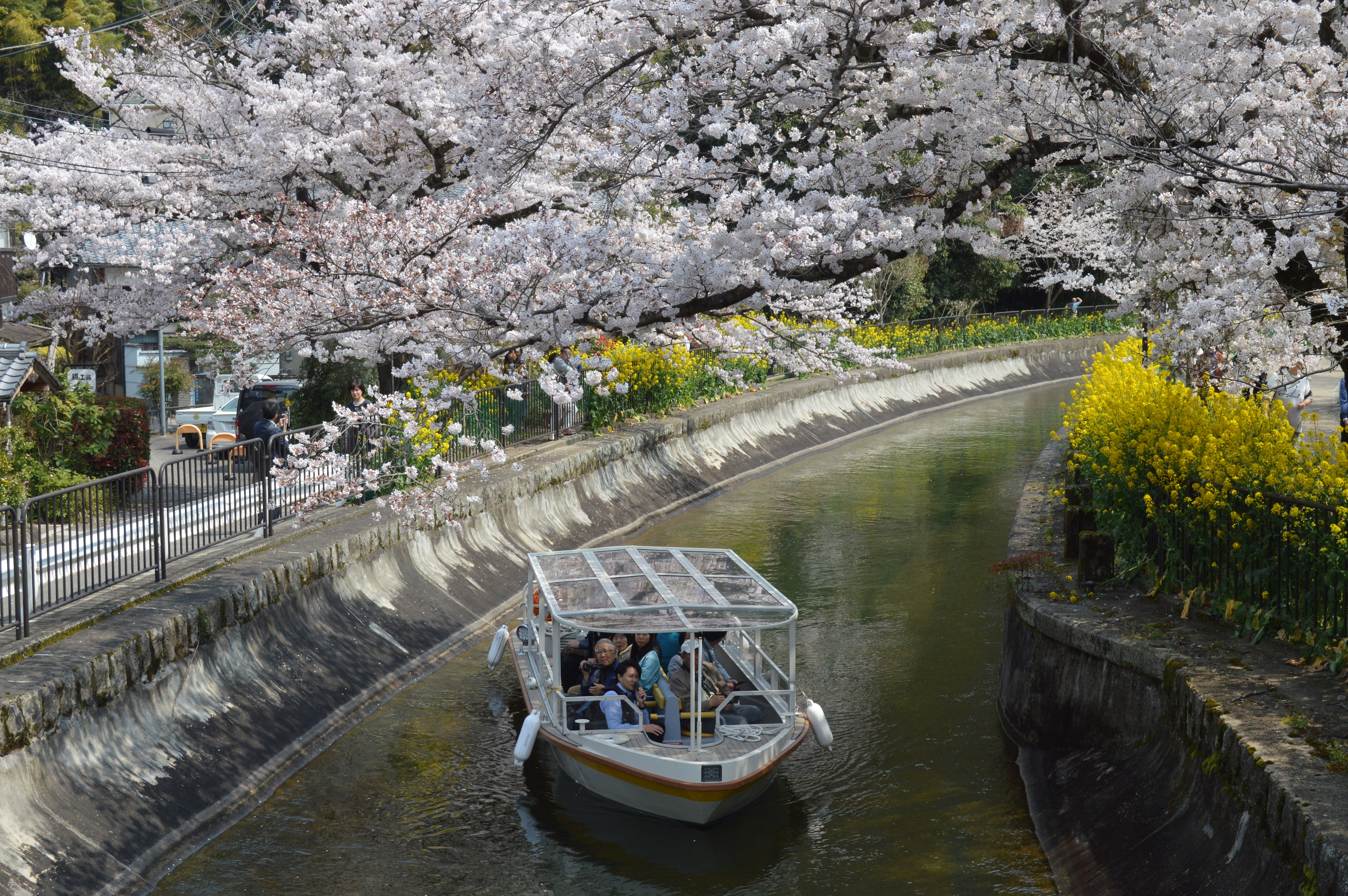 琵琶湖疎水（山科疎水）。京都府京都市山科区。2018年に運航を開始した遊覧船「びわ湖疏水船」。